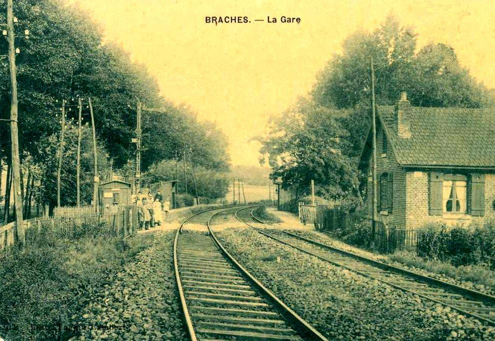 Le point d'arrêt de Braches, alors que la ligne était encore à double voie.